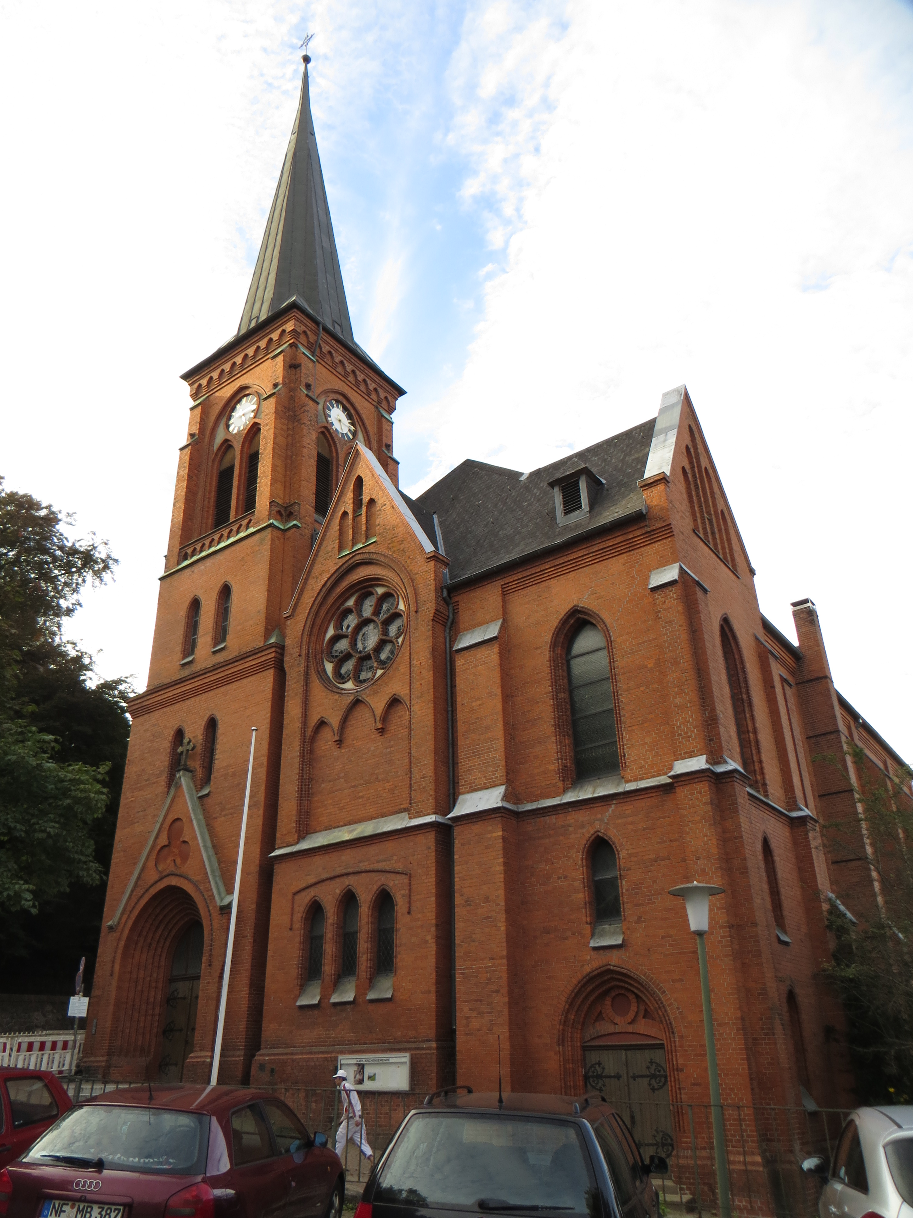 Schmerzhafte Mutter St. Maria-Kirche (Flensburg 2013), Bild 02